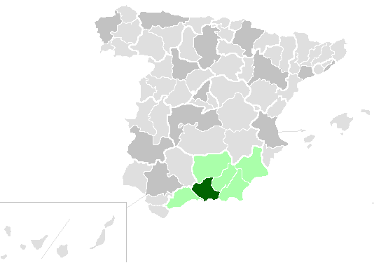 Territorio de la diocesis de Granada, mapa